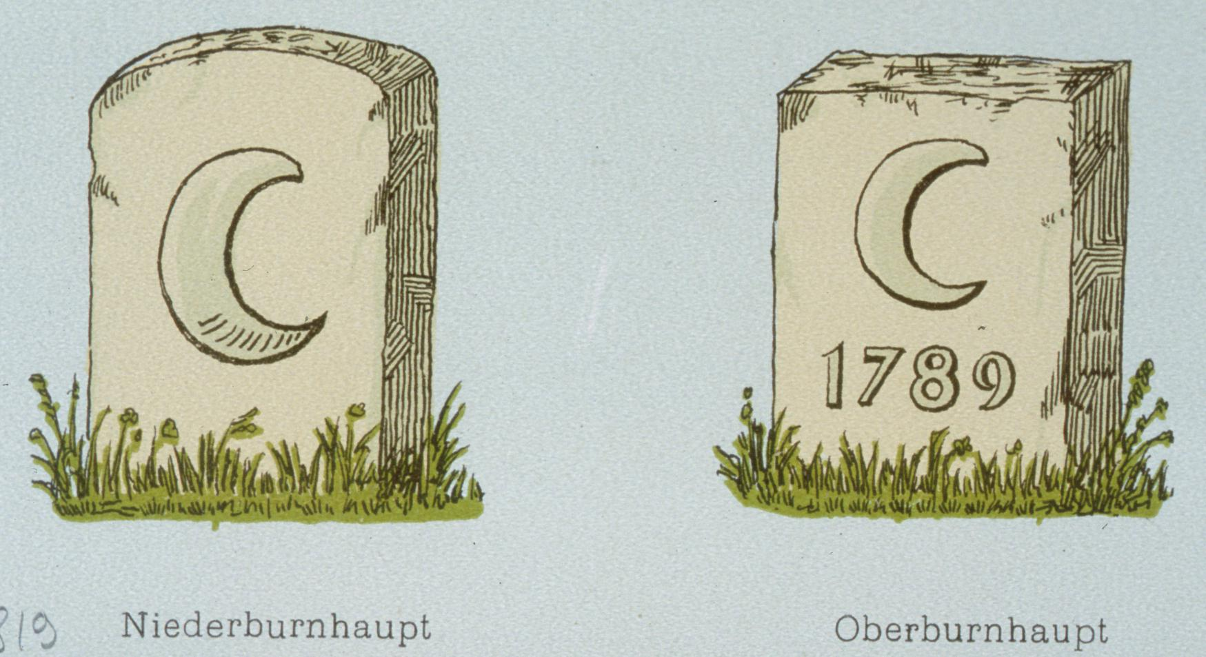 Ober-Elsass. Kanton Sennheim. Niederburnhaupt, Oberburnhaupt HERALDIQUE, Burnhaupt-le-Bas, Burnhaupt-le-Haut, de L. SCHŒNHAUPT, ill. (1900) Cote(s) du document original : M.38.381. - . Armoiries de bornes; In : Wappenbuch der Gemeinden des Elsass, nebst Darstellung der Bannsteine mit statistichen Notizen fuer jede Gemeinde, herausgegeben von Ludwig Schœnhaupt. - Strassburg : J. Noiriel, 1900, (pl. 819); NBI 1.